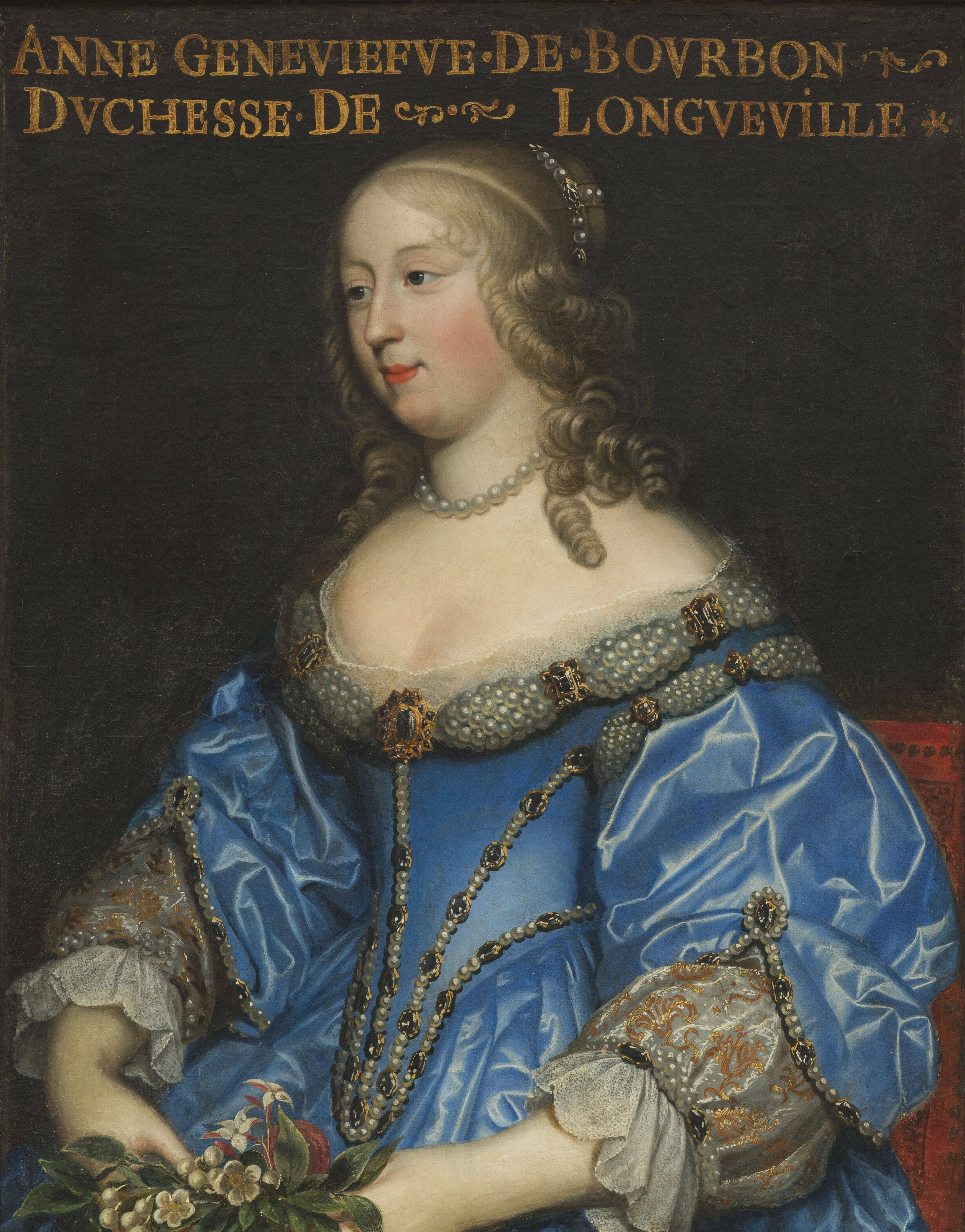 Anne-Geneviève de Bourbon-Condé (1619-1679), duchesse d'Estouteville et de Longueville